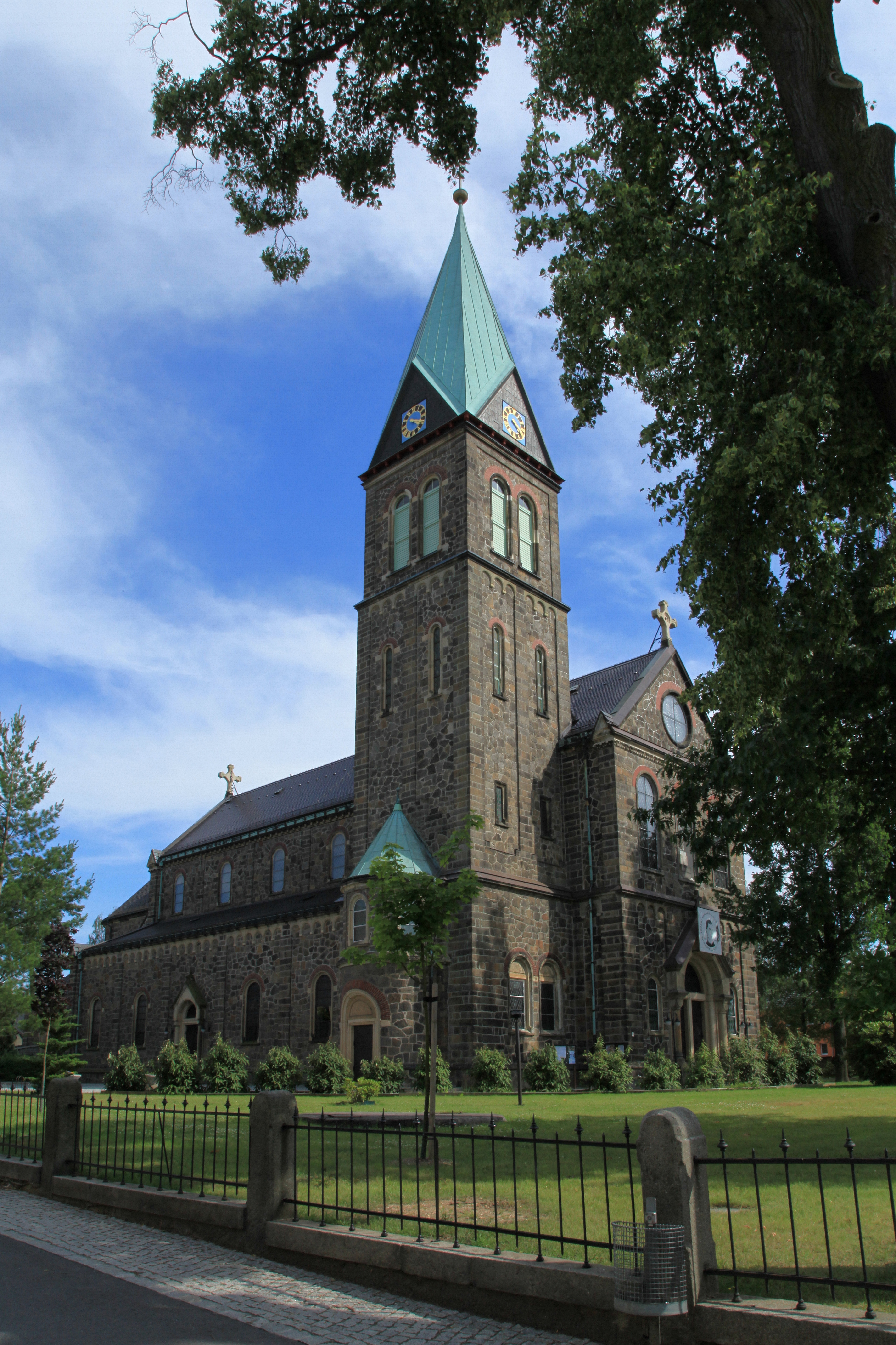 Kirche Maria Rosenkranzkönigin, Dr.-Maria-Grollmuß-Straße in Radibor Hornjoserbsce: Cyrkej swj. Marije, kralowny swjateho róžowca w Radworju